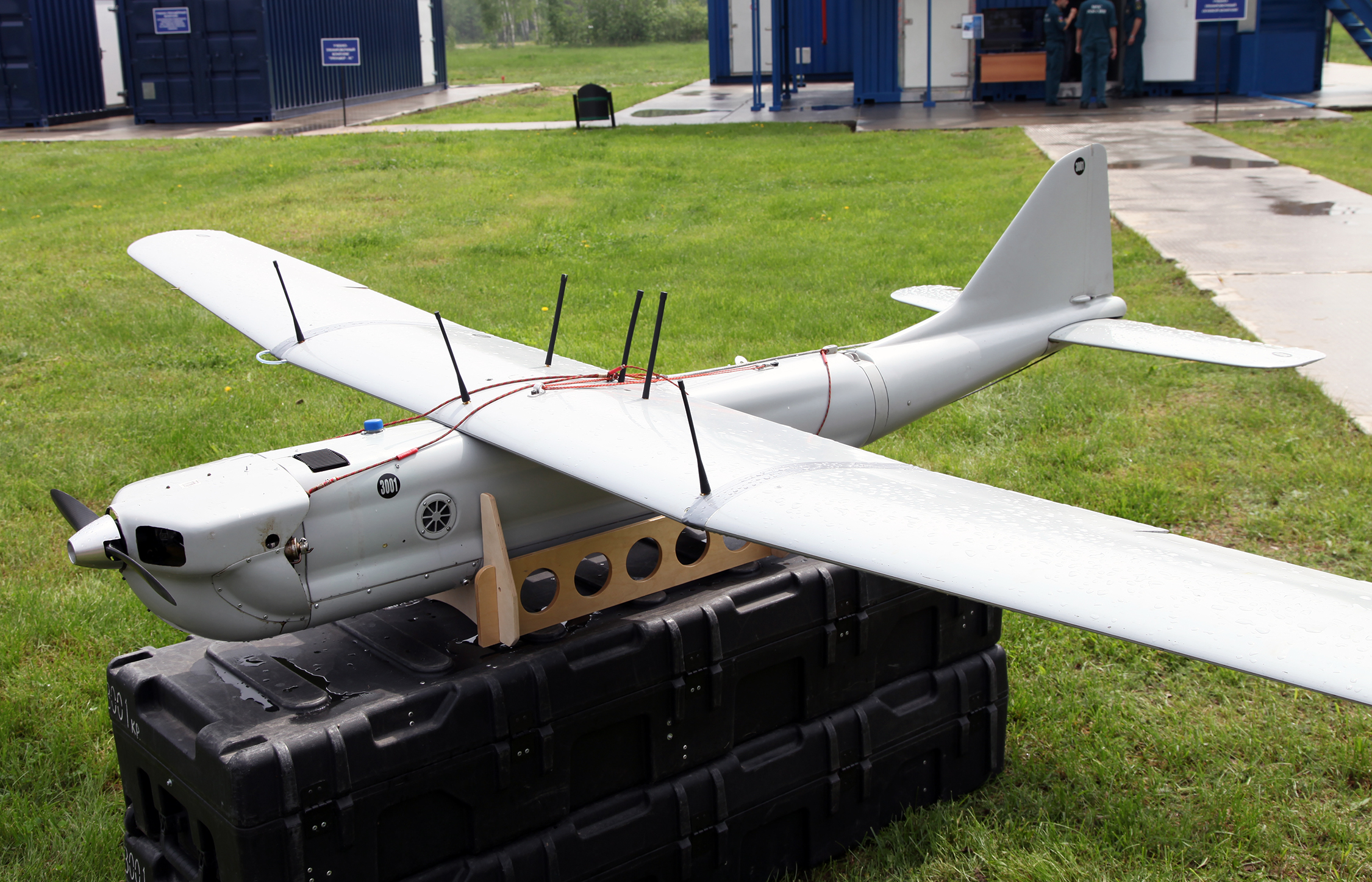 БПЛА Орлан-30 (Orlan-30 UAV)